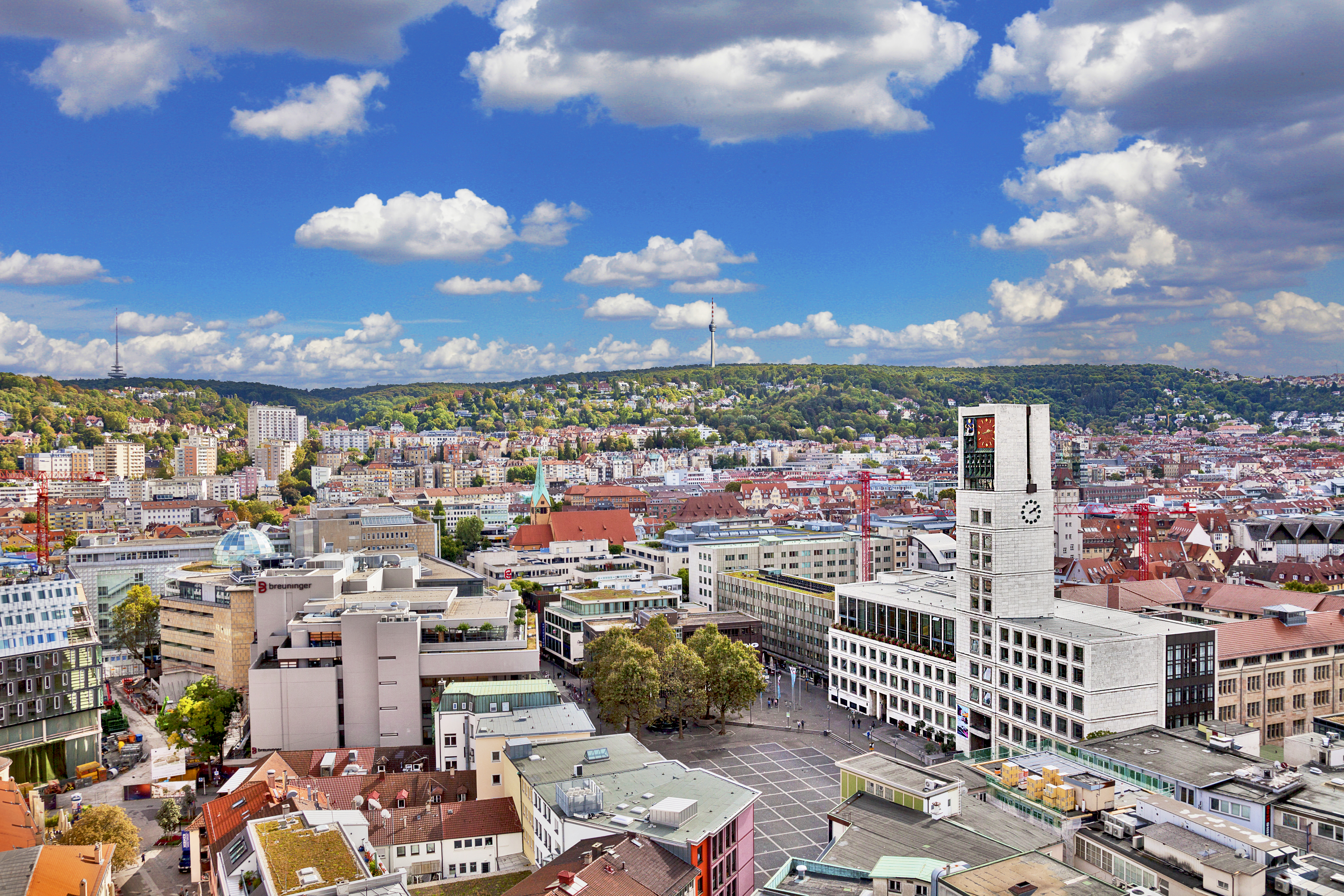 Rathaus Stuttgart und Stuttgart Ost